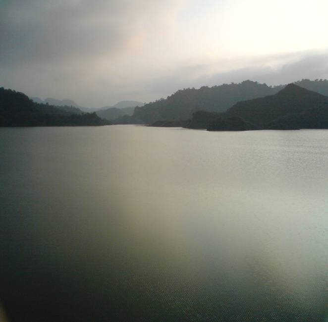 Khai Dam Near Bhaun